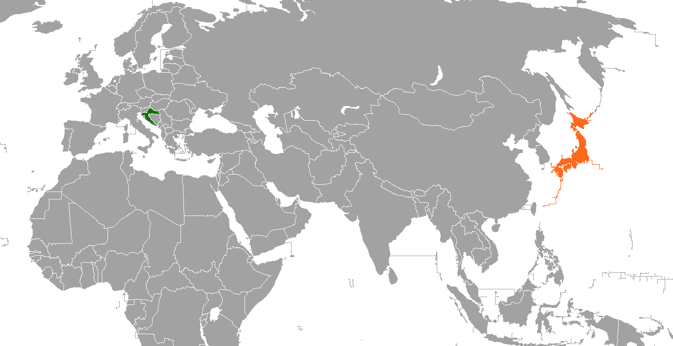 Croatia-Japan locator map.